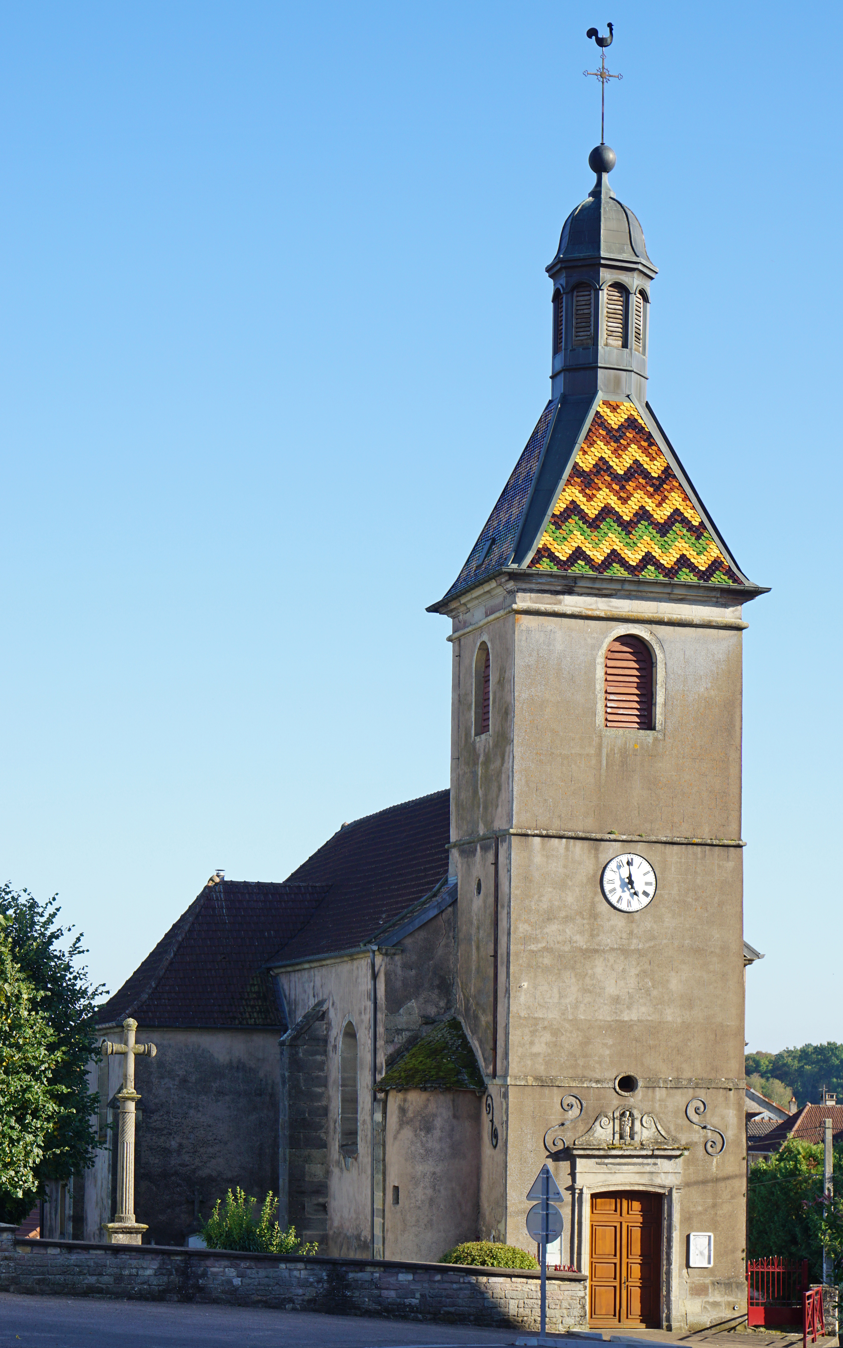 L'église d'Ailloncourt.